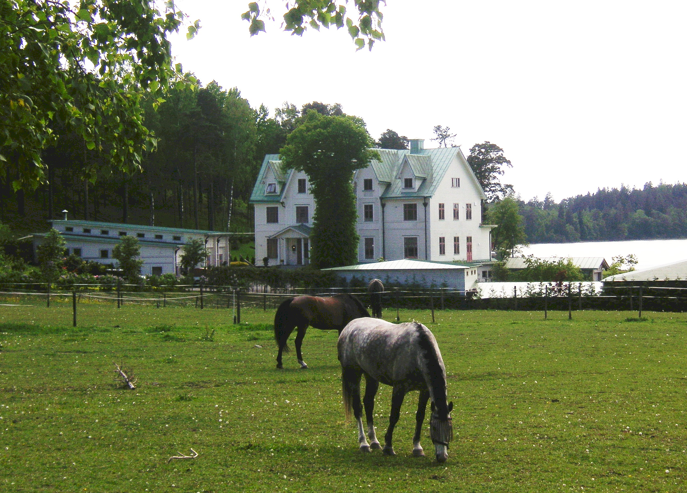 Lunda Villa på Lovön. Huset uppfördes enligt uppgift omkring 1870 som sommarvilla och brann ner 2011. Var ett byggnadsminne mellan 1979 och 2011.